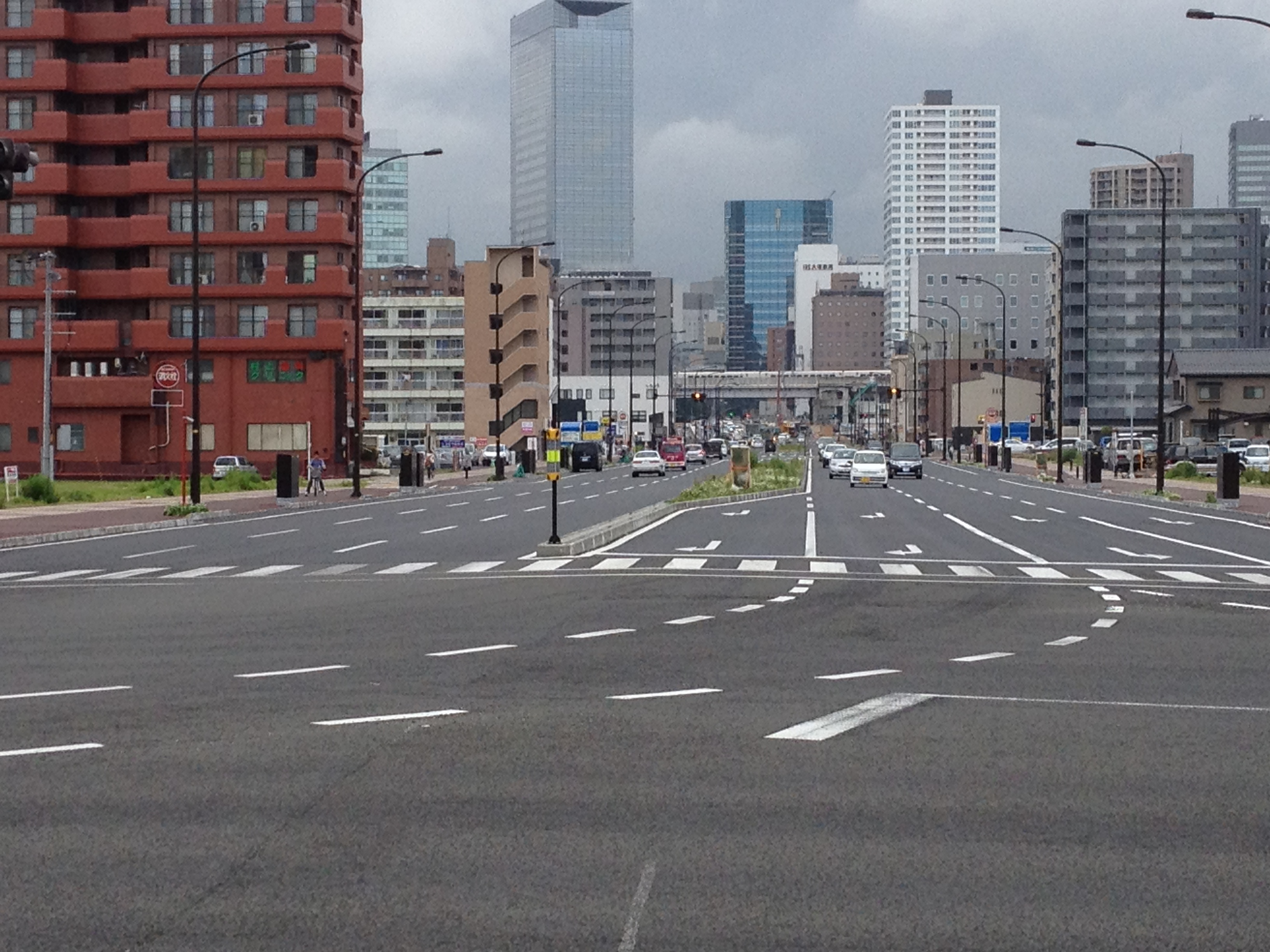 仙台市道元寺小路福室線